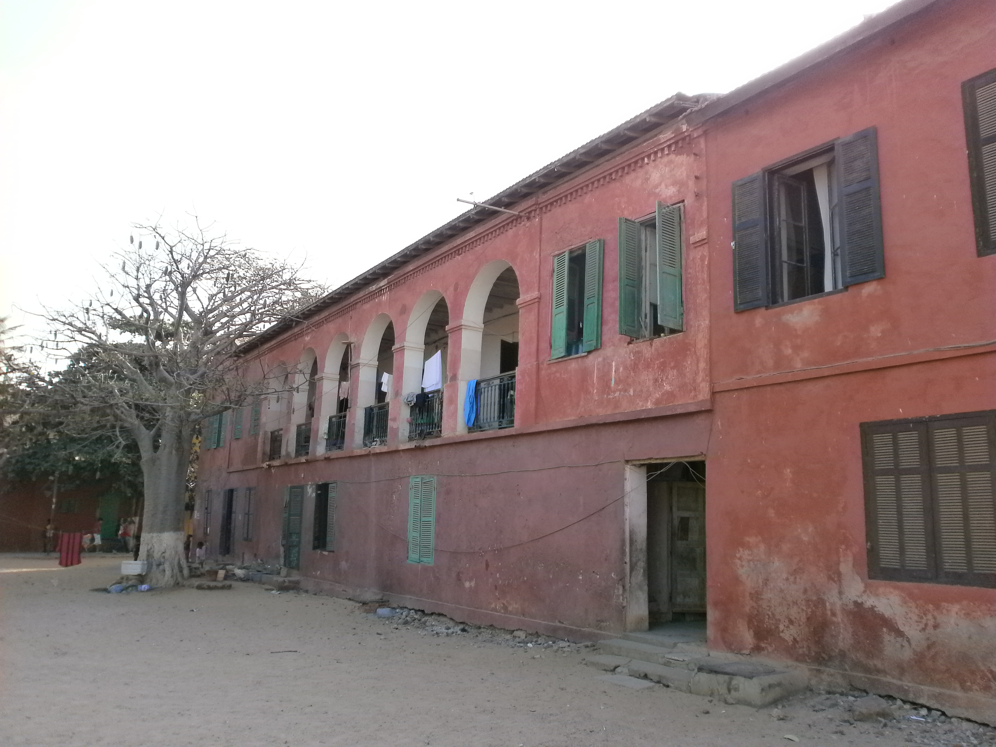 Ancienne école normale William-Ponty de Gorée